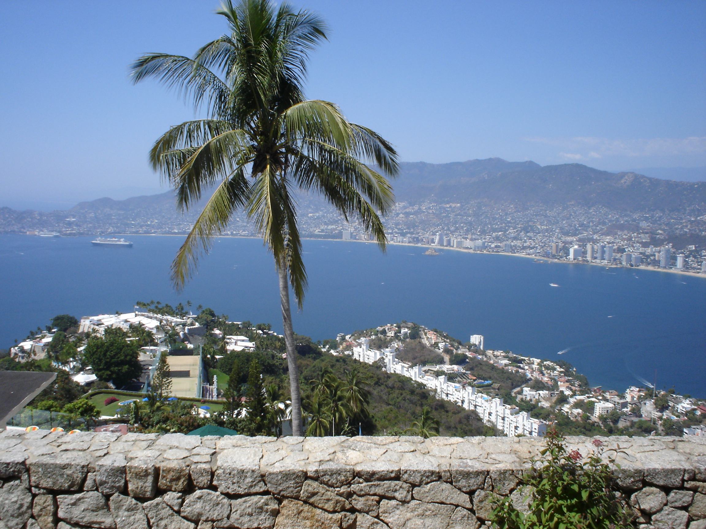 La Bahía de Acapulco, vista desde la Capilla Ecuménica de la Paz.